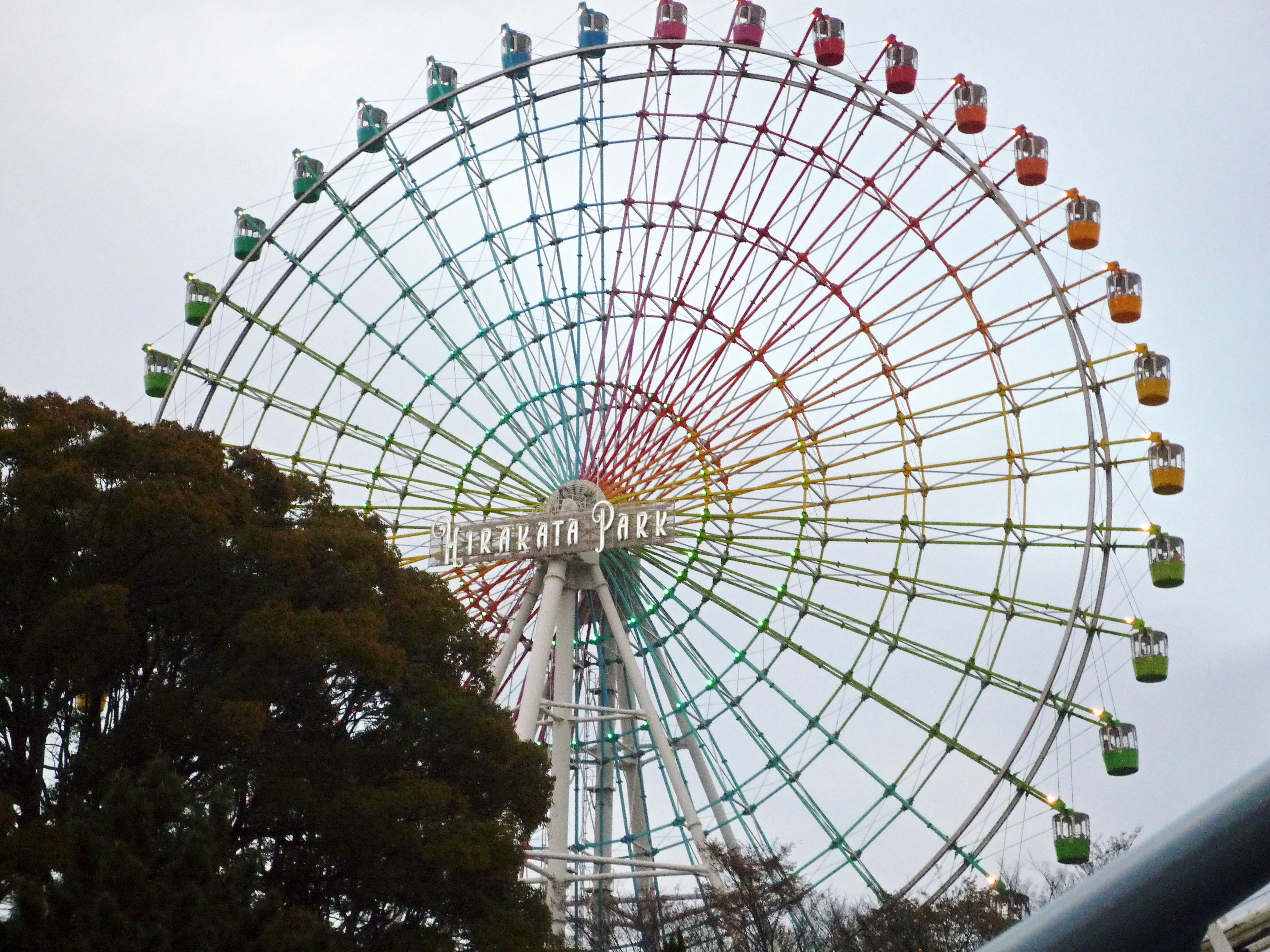 Hirakata Park大観覧車